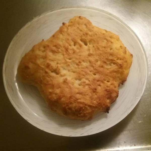 Itse leivottu teeleipä.